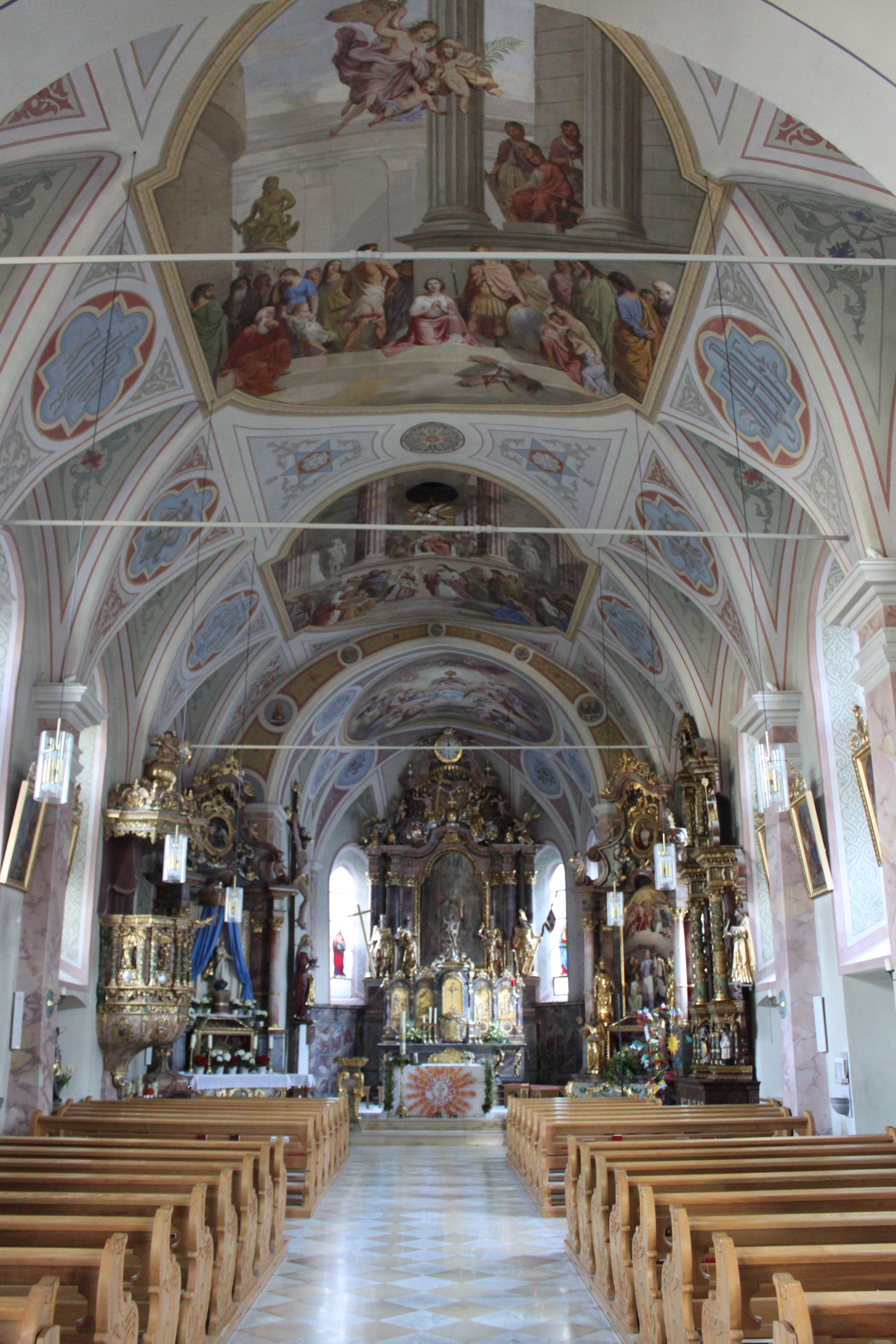 Katharinenkirche (Längenfeld), Langhausinneres Richtung Chor und Hochaltar